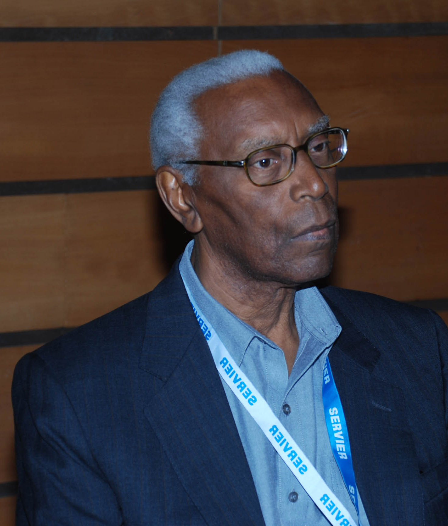 Carlos Graça, político, médico, escritor São-tomense.